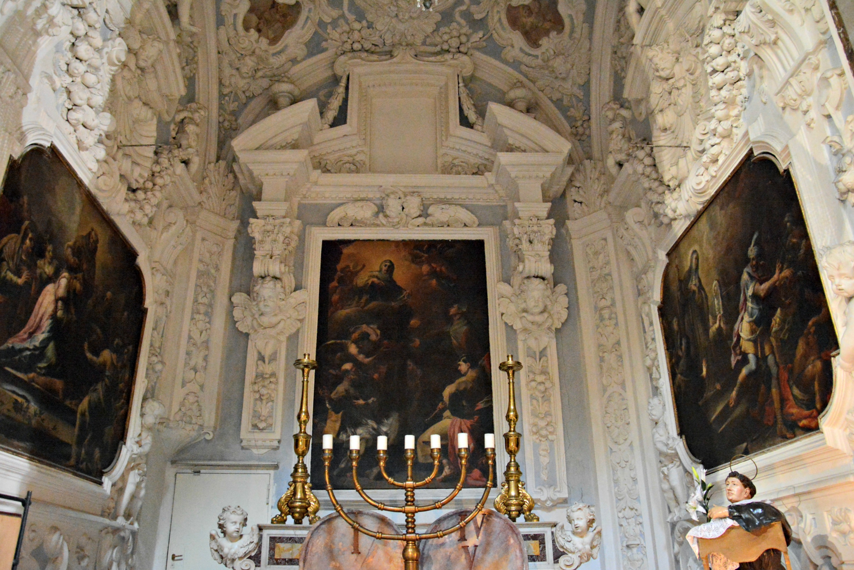 Vedi titolo